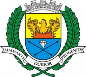 Brasão Diamantino